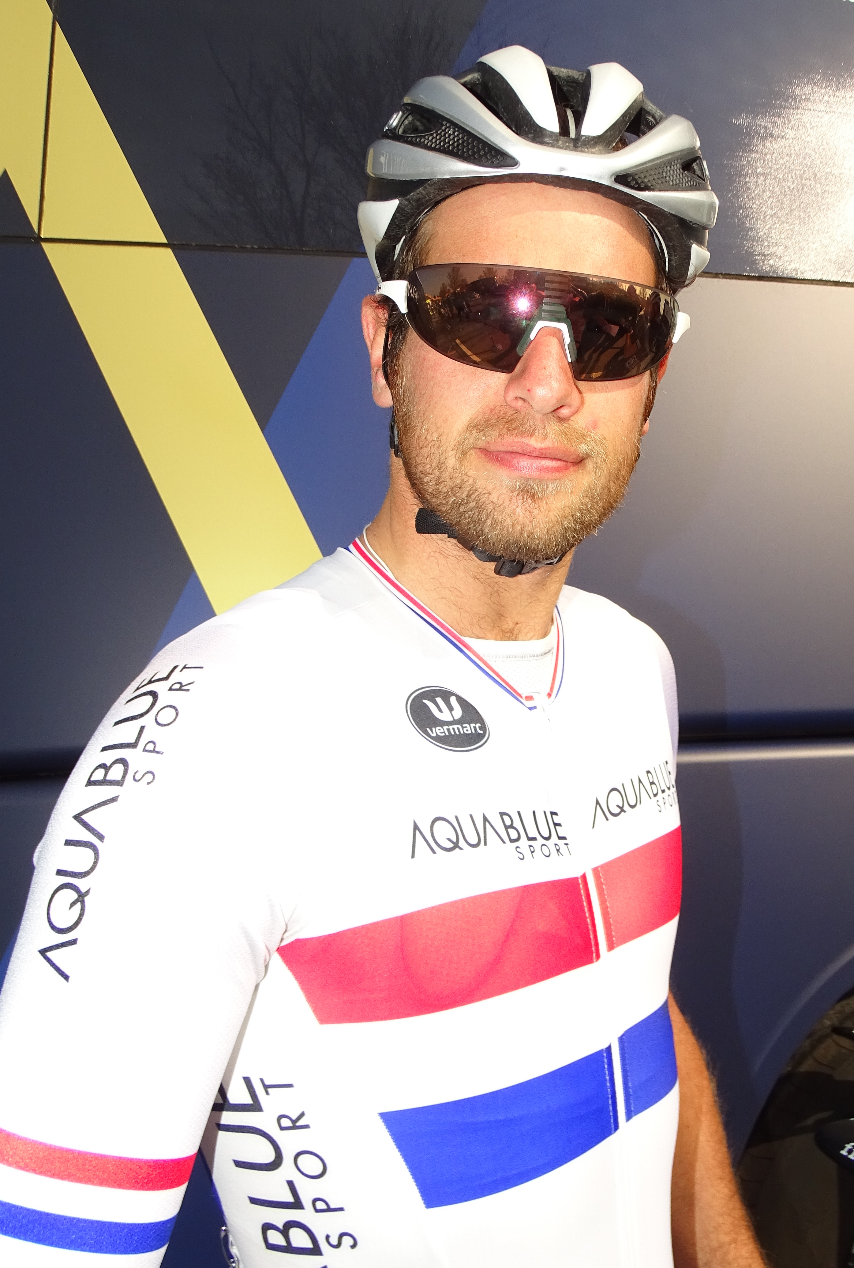 Reportage réalisé le mardi 28 mars à l'occasion de du départ de la première étape des Trois jours de La Panne 2017 à Adinkerque (La Panne), Belgique.